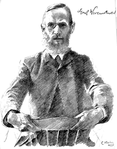 Erik Werenskiold (* 1855; † 23. November 1938), norwegischer Maler und Zeichner.